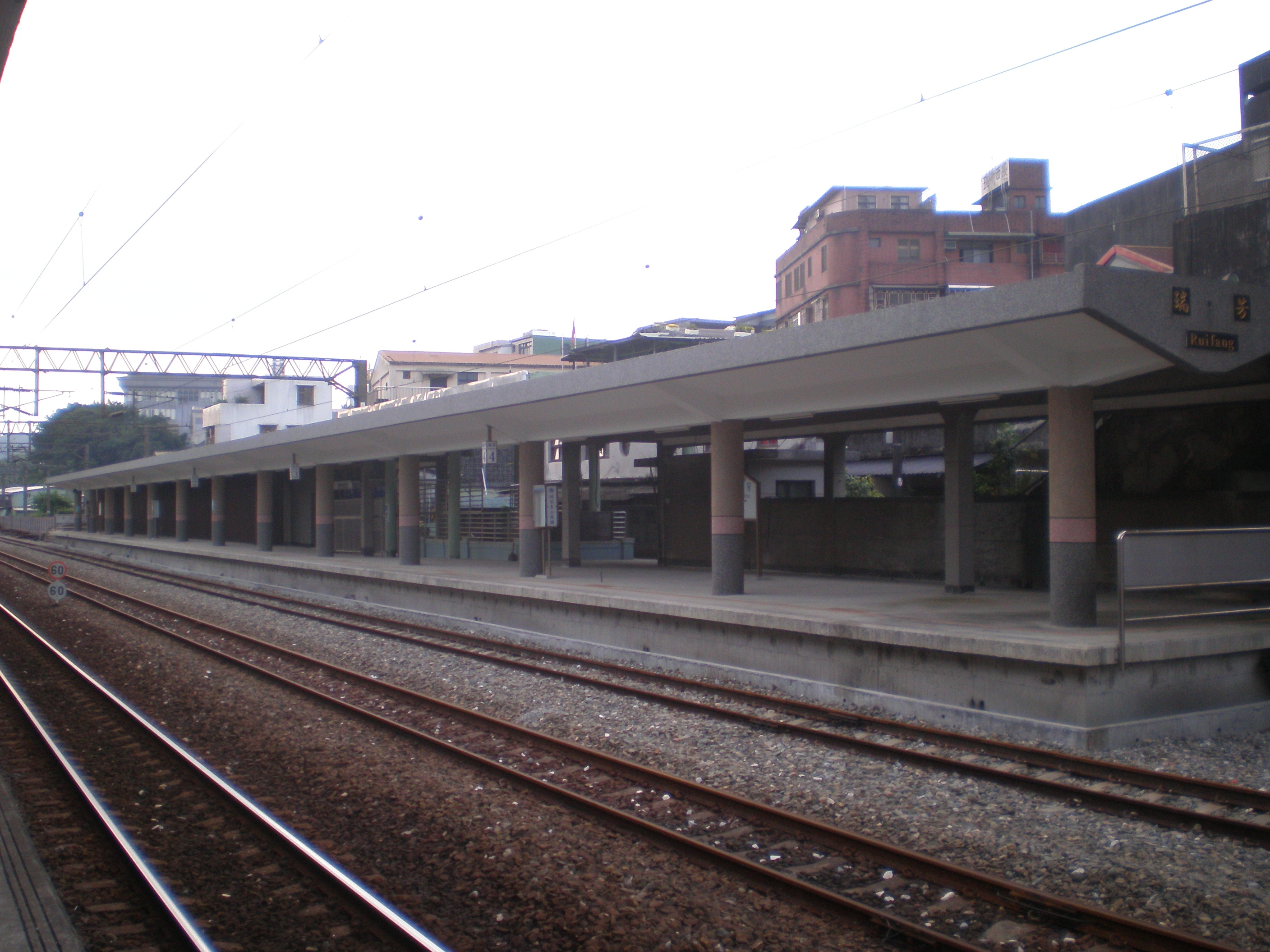 中文（台灣）: 臺灣鐵路管理局瑞芳車站第三月台。